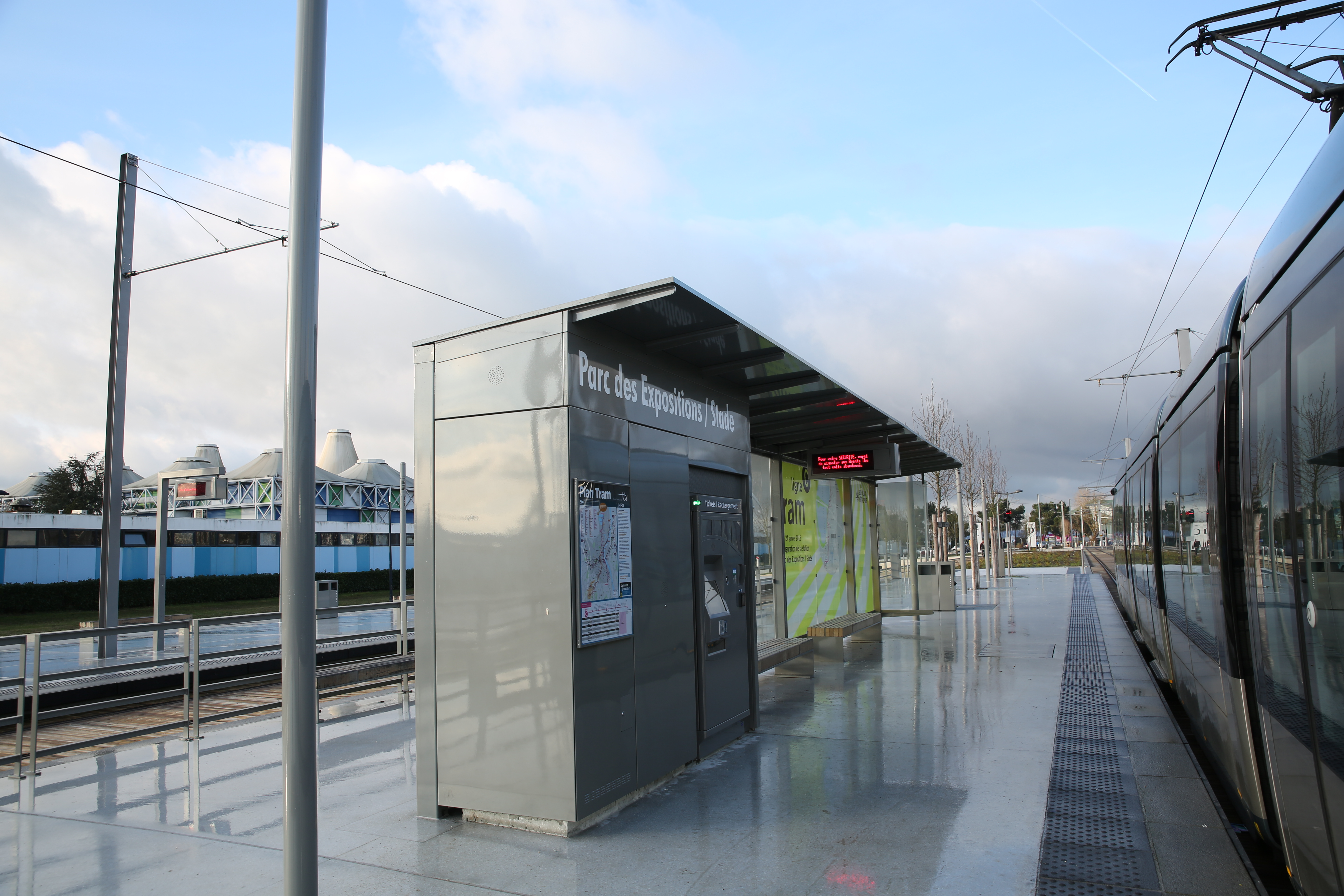 Station Parc des Expositions - Stade du tramway de Bordeaux le jour de sa mise en service.Terminus de la ligne C.